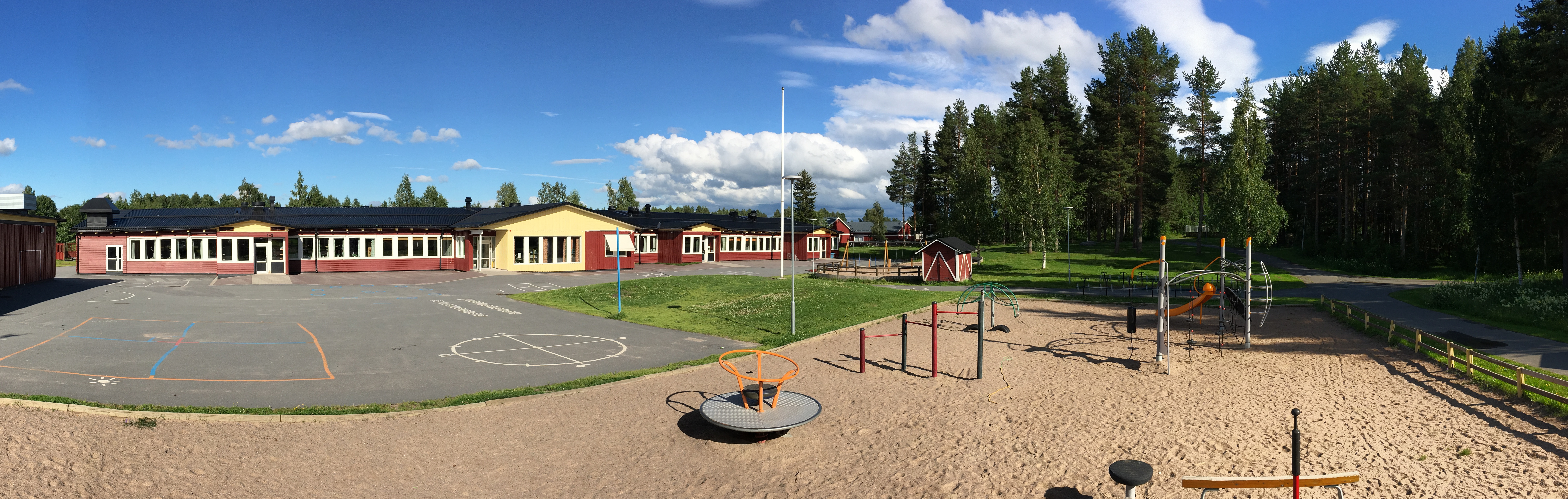 Torpgärdsskolan i Boden sommaren 2016. Skola med verksamhet från förskola till årskurs 6 samt fritidshem. Skolan ligger ca. 5 kilometer från Bodens centrum i stadsdelen Södra Svartbyn.